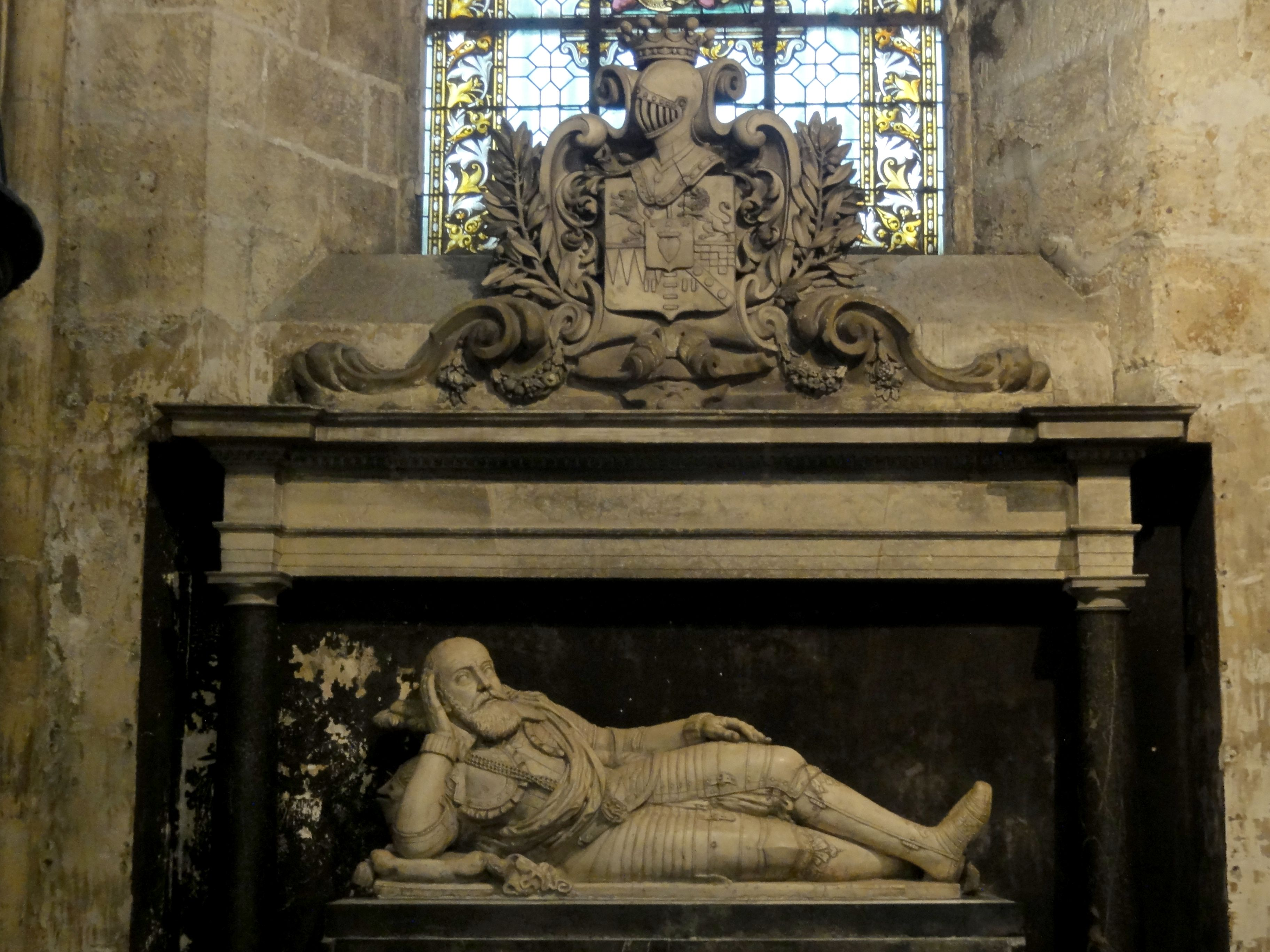 Chapelle St-Joseph, monument de Guillaume Douglas.